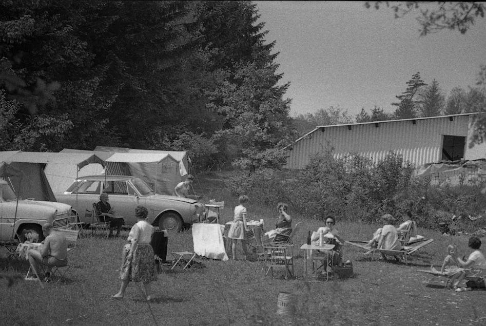 Flugplatz Hezleser Berg Sommer 1964 "Alte Halle"